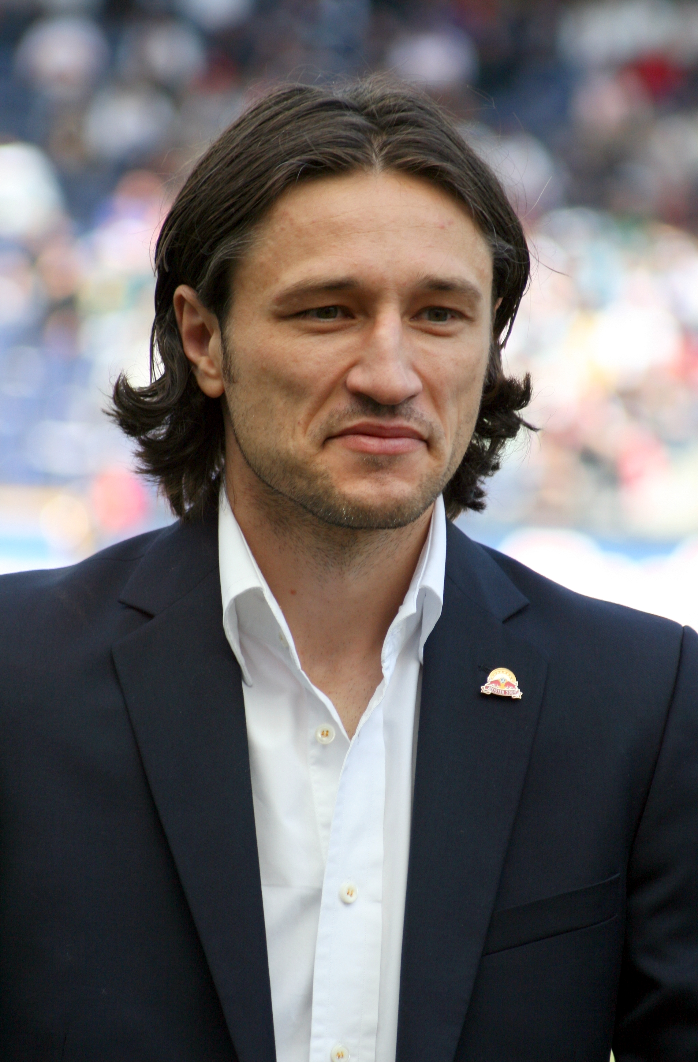 Der ehemalige kroatische Fußballnationalspieler Niko Kovač